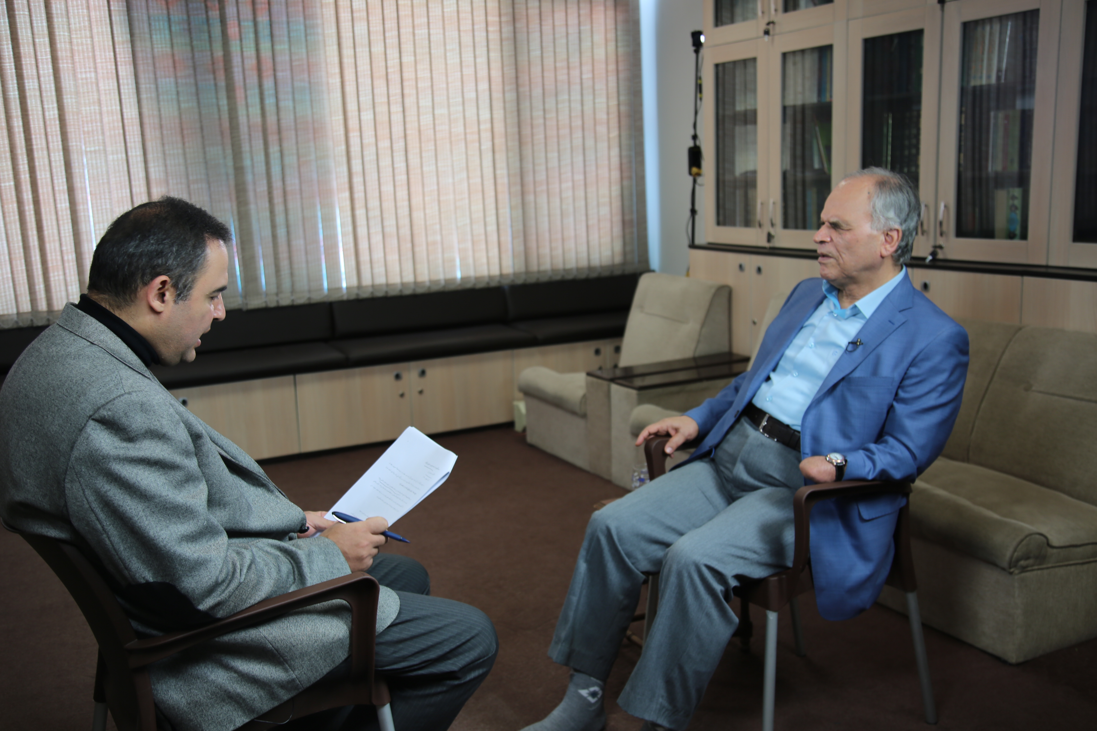 تصاویر در حین ضبط برنامه خشت خام از مجموعه تاریخ آنلاین گرفته شده‌اند.